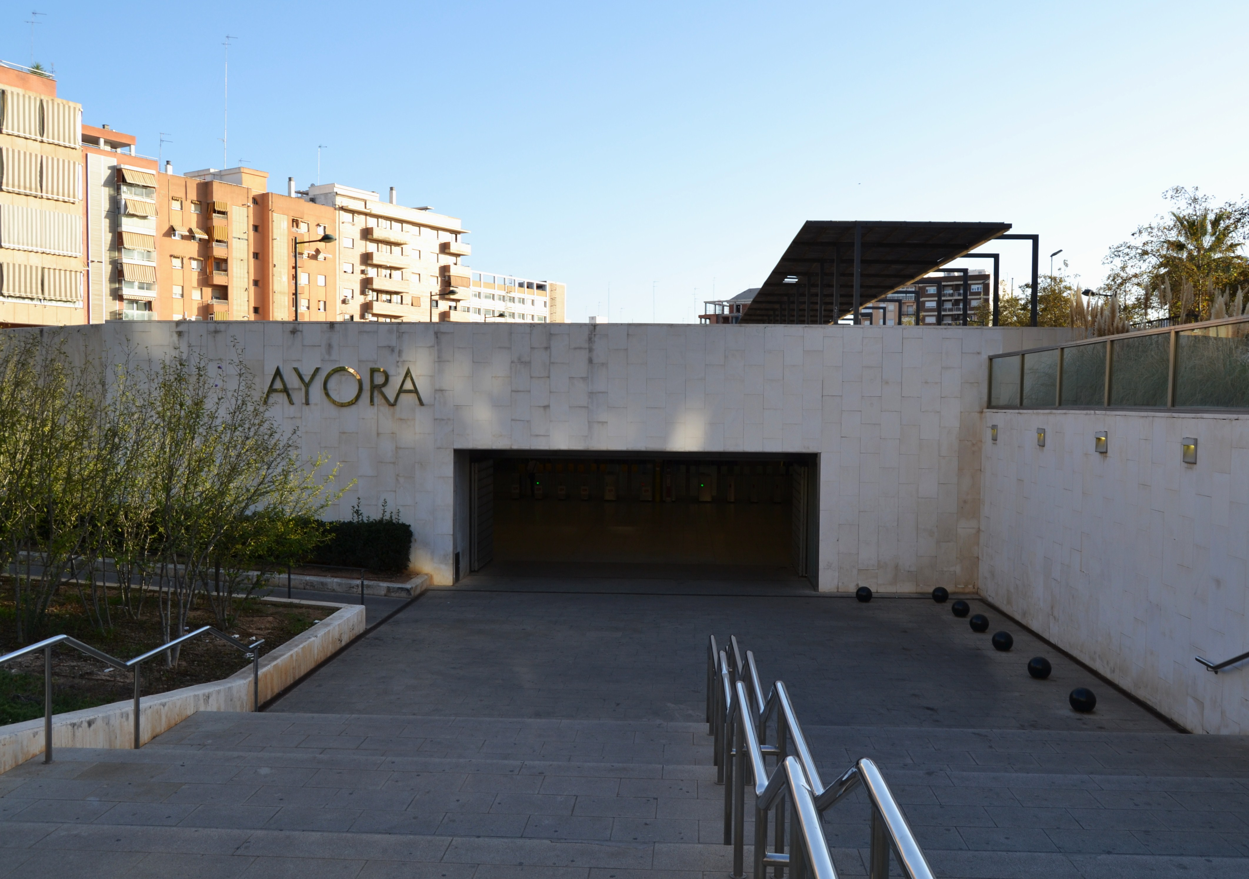 Estació d'Aiora del Metro de València, exterior.